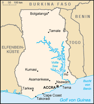 Karte von Ghana